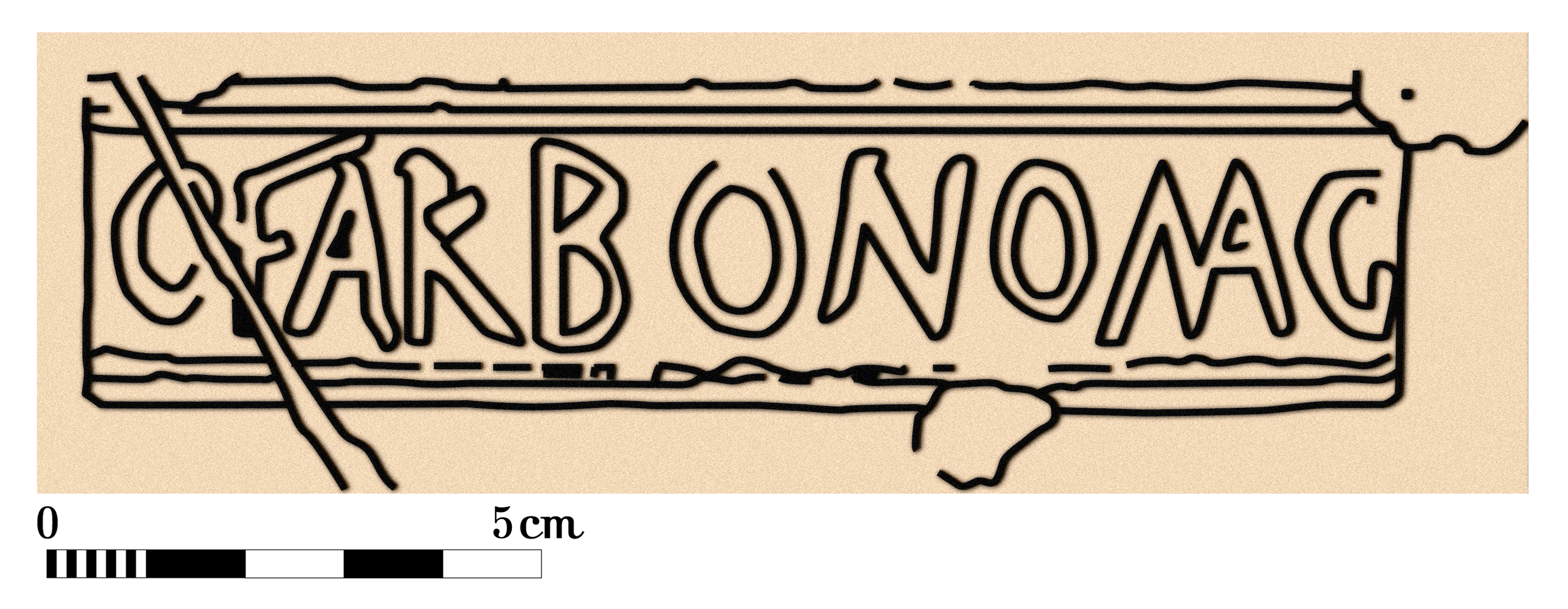 Ziegelstempel OFARBONOMAG (sesquipedalis later) vom Gelände des Kastells Göd-Bócsaújtelep. Fundstelle: Streufund vom Grundstück Parz. Umzeichnung nach einer Darstellung in: Zsolt Mráv: Archäologische Forschungen 2000–2001 im Gebiet der spätrömischen Festung von Göd-Bócsaújtelep (Vorbericht) 2002. In: Communicationes archeologicae Hungariae 2003. Népművelési Propaganda Iroda. Budapest 2003. S. 103.